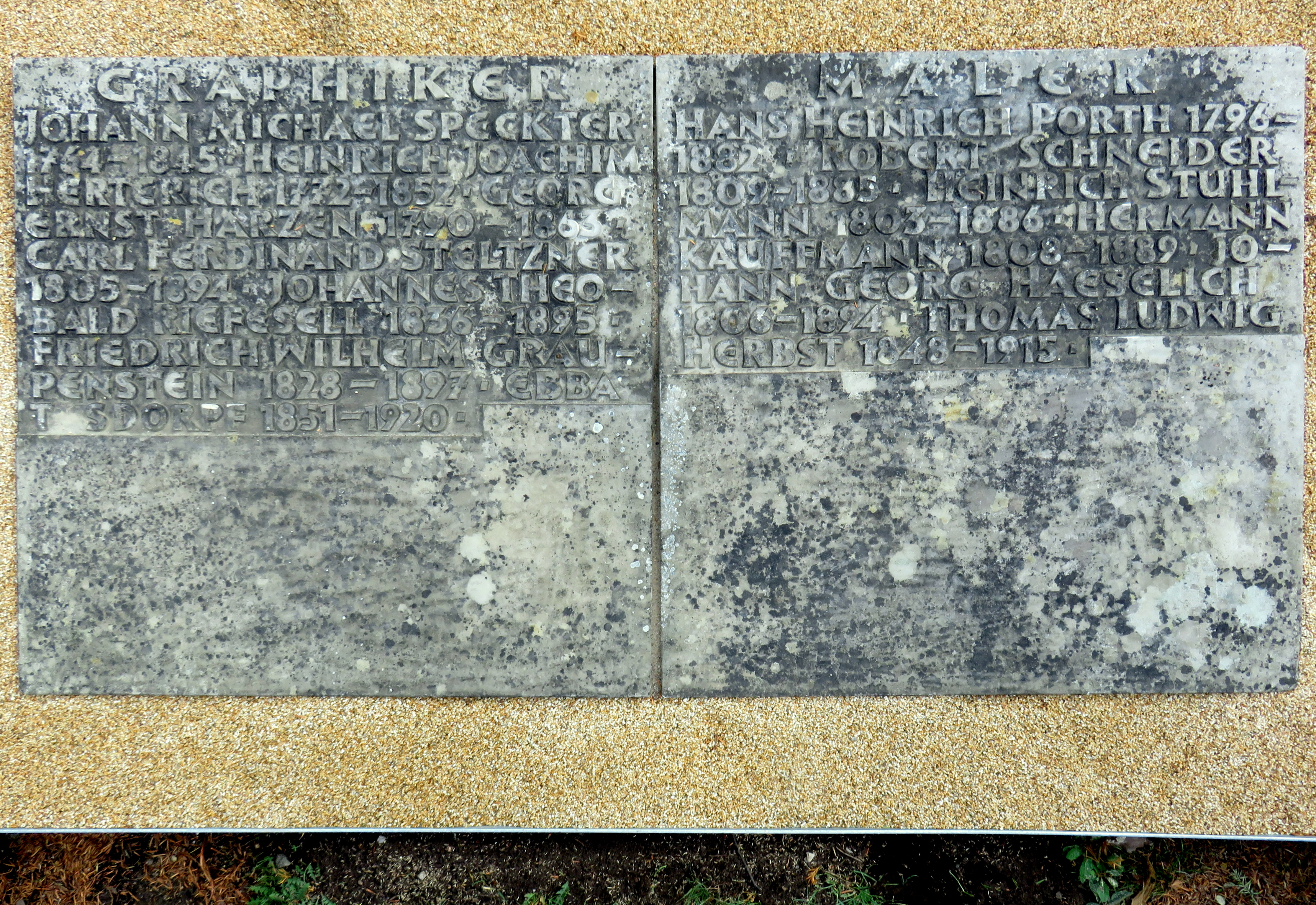 Doppel-Sammelgrabmal Graphiker/Maler im Bereich des Althamburgischen Gedächtnisfriedhofs auf dem Hamburger Friedhof Ohlsdorf zu Ehren von u. a. Johannes Michael Speckter, Heinrich Joachim Herterich, Johann Theobald Riefesell, Ebba Tesdorpf, Friedrich Wilhelm Graupenstein, Heinrich Stuhlmann, Carl Ferdinand Stelzner, Robert Schneider, Hermann Kauffmann, Georg Haeselich und Thomas Herbst.